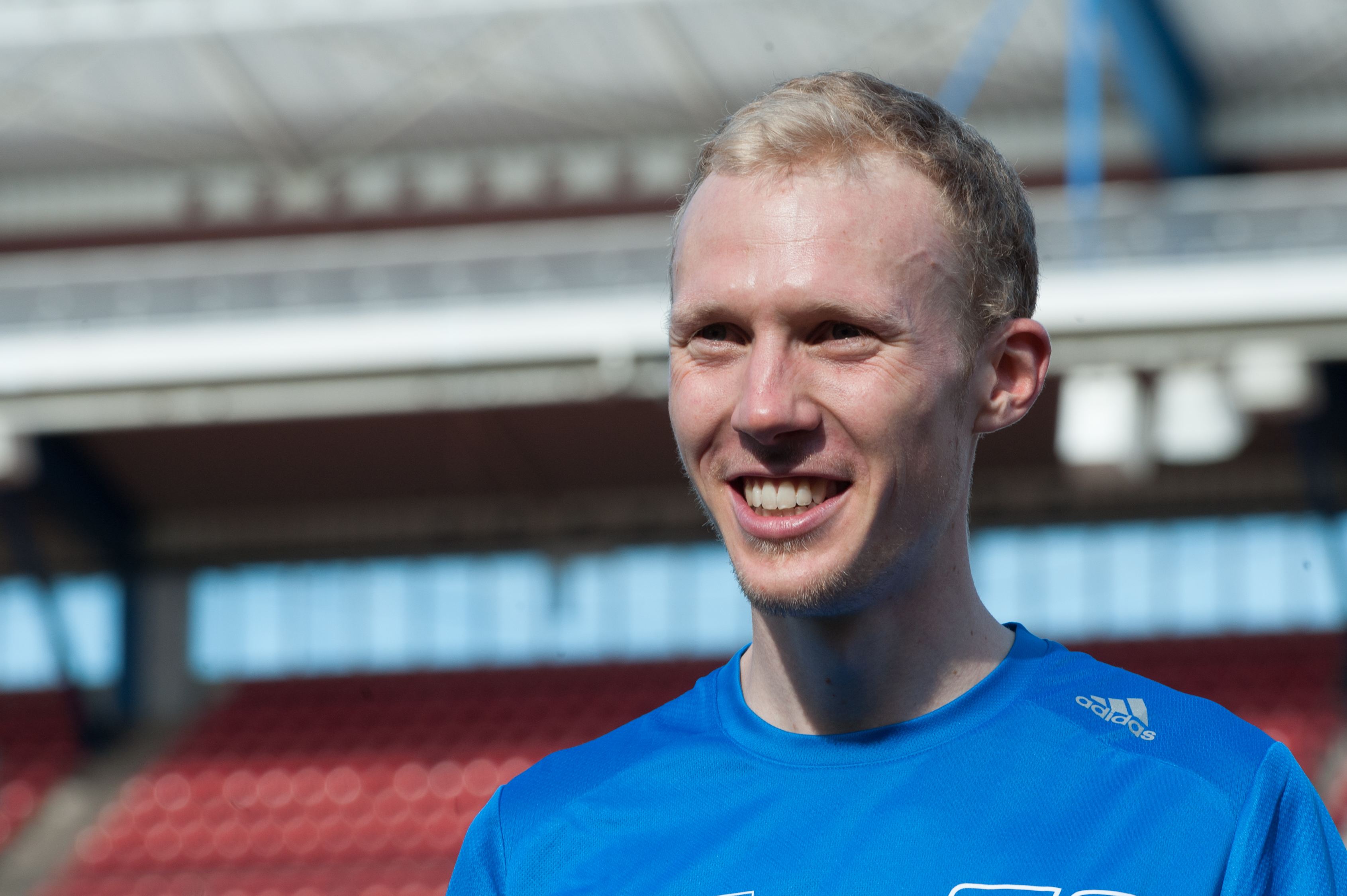 Deutsche Leichtathletik-Meisterschaften 2015: Richard Ringer, VFB LC Friedrichshafen